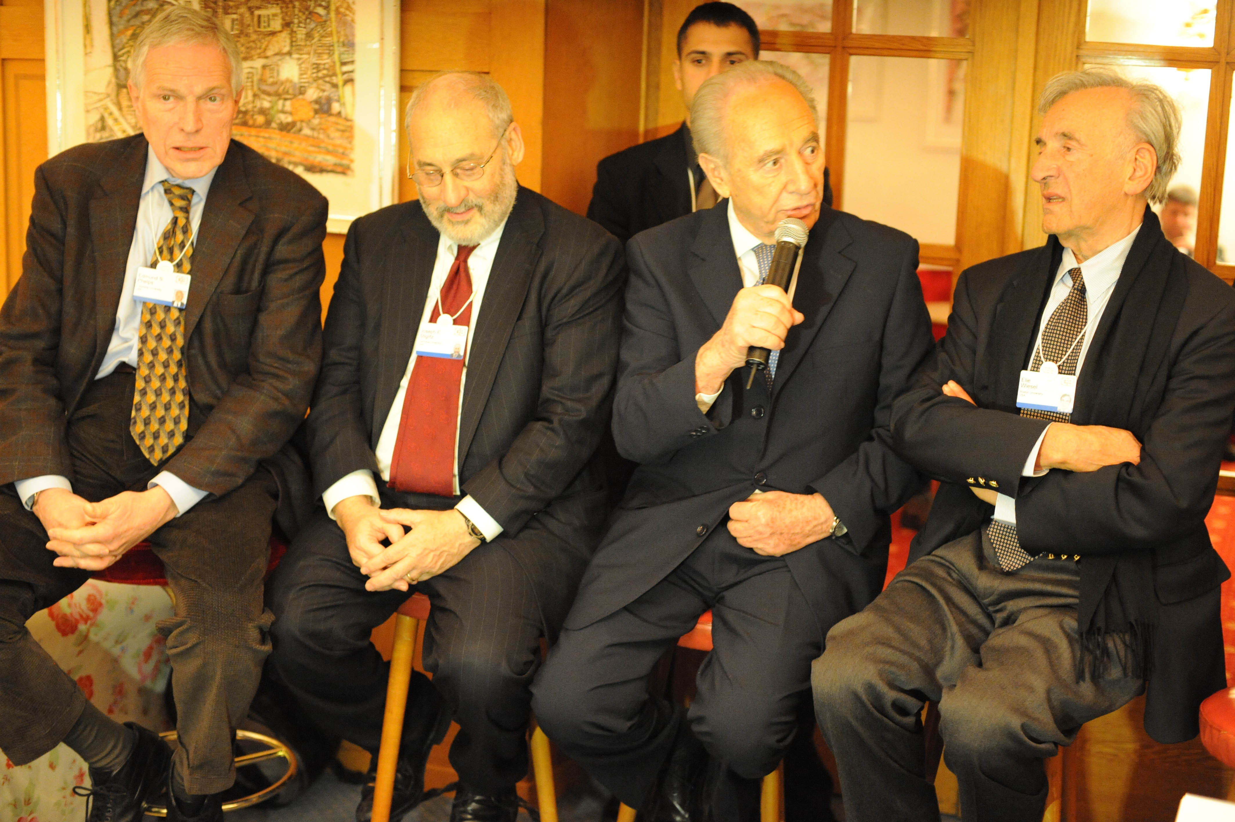 Edmund Phelps, Joseph Stiglitz, Shimon Peres, Elie Wiesel.